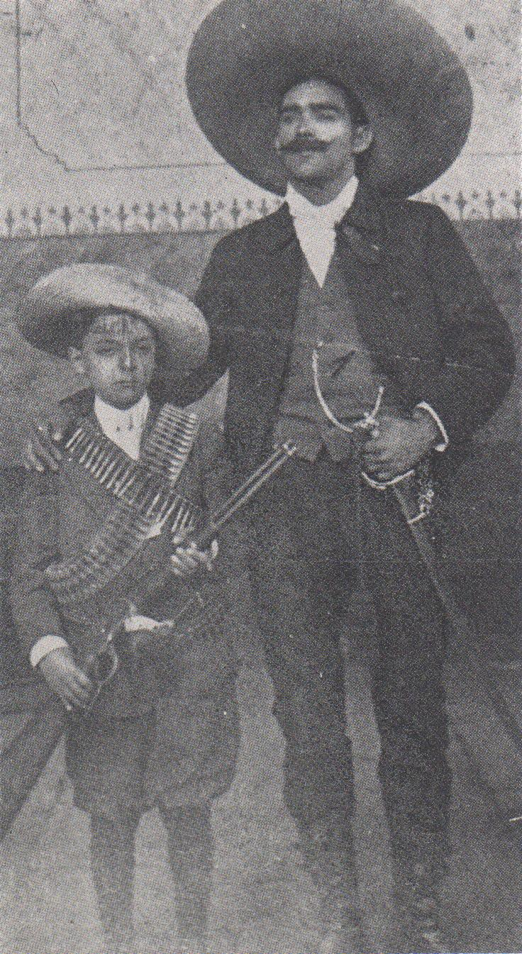 General Martín Castrejón